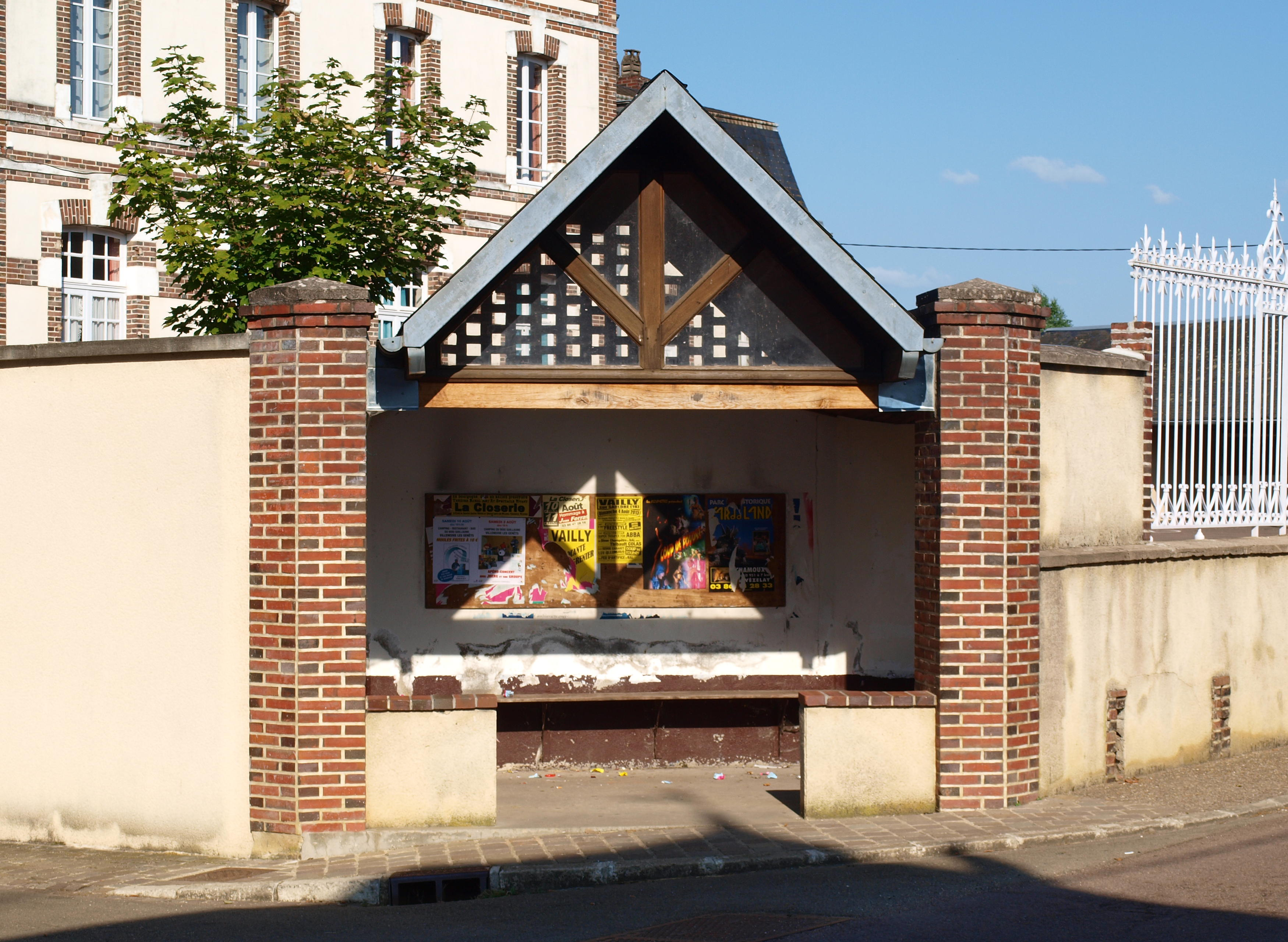 Mézilles (Yonne, France) ; abribus de la mairie-école.